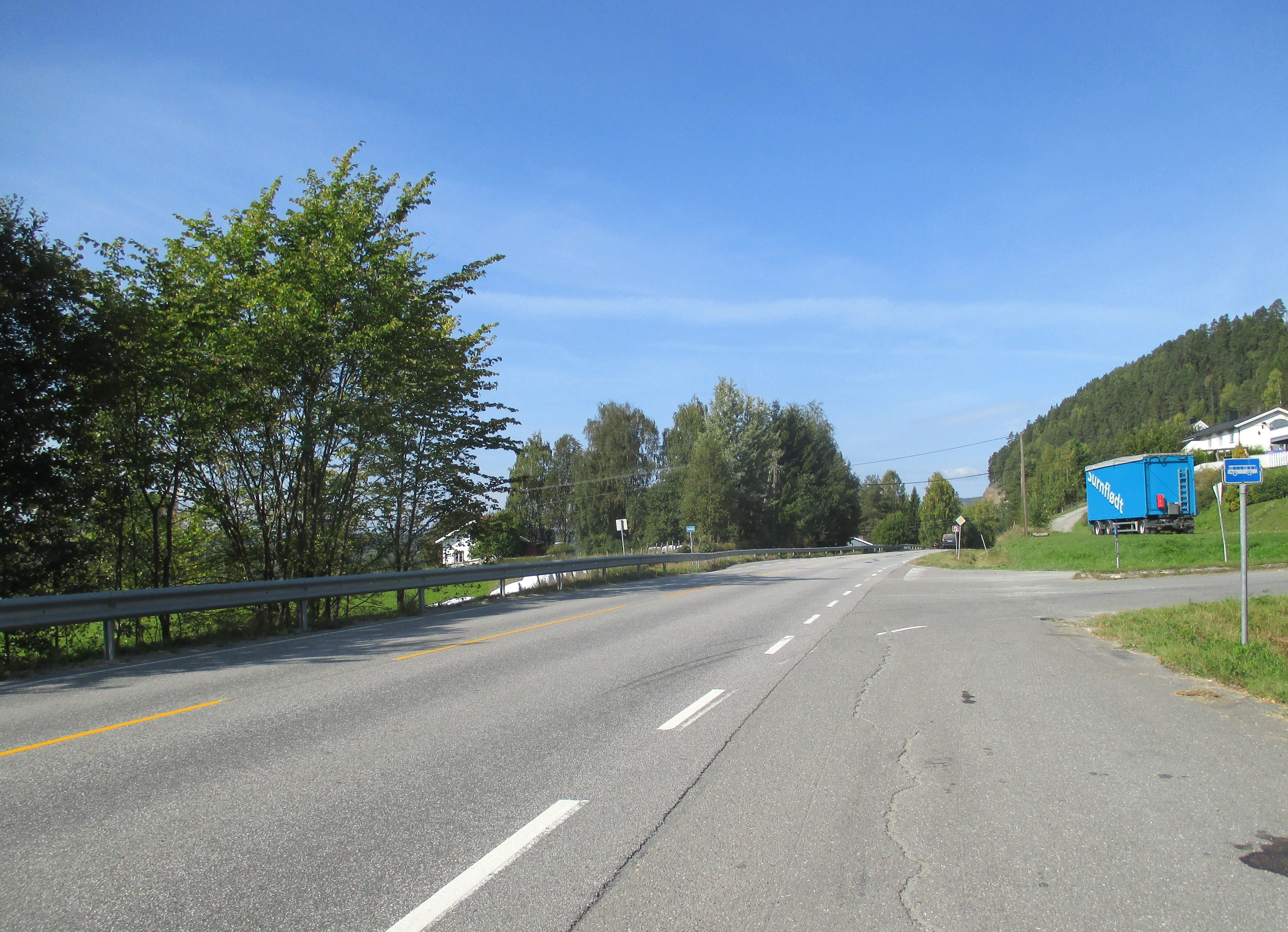 Fylkesvei 184 like nord for Brumunddal